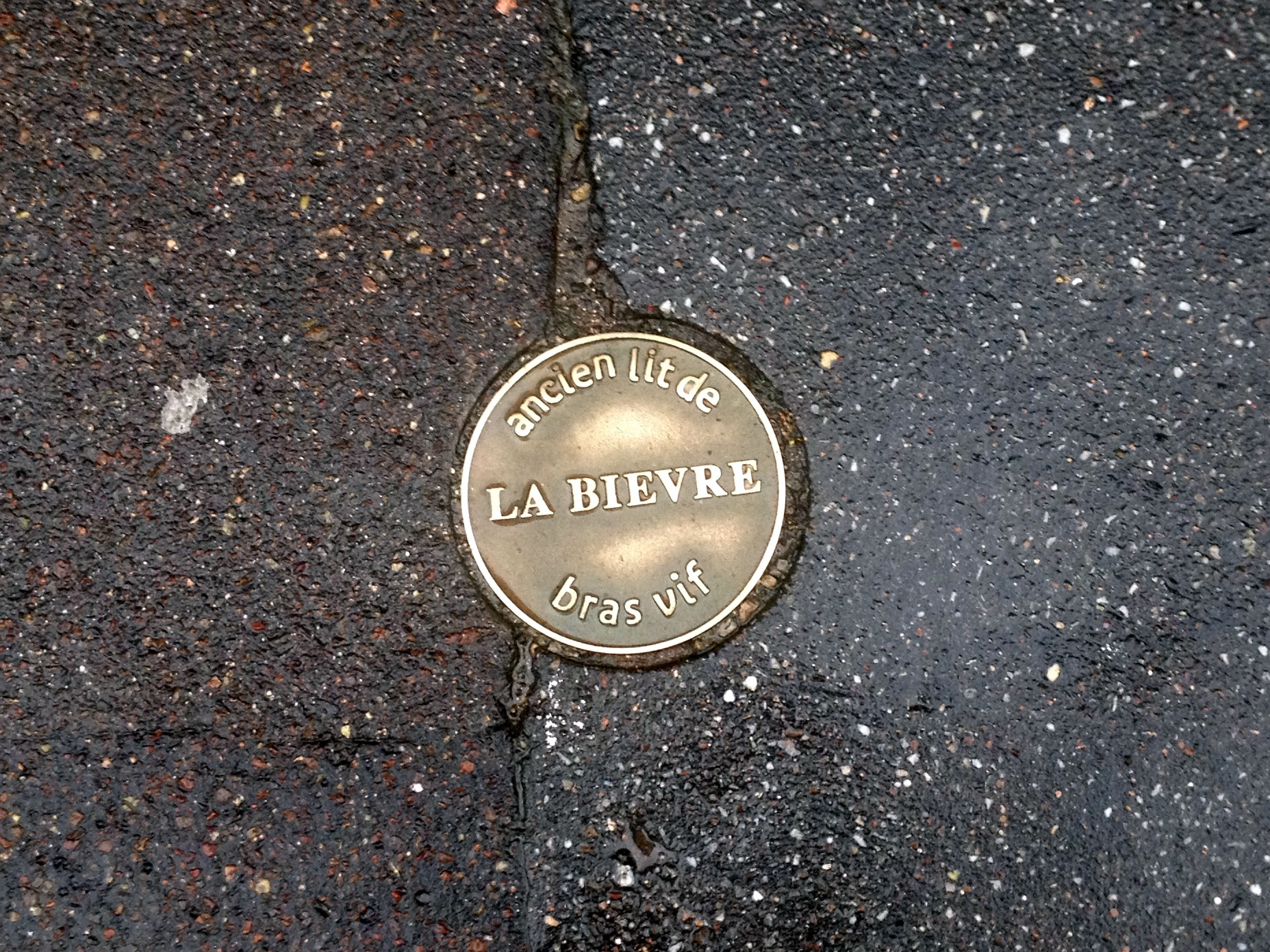 Signe de l'ancien lit de la rivière Bièvre dans le XIIIe à Paris (rue Daviel).